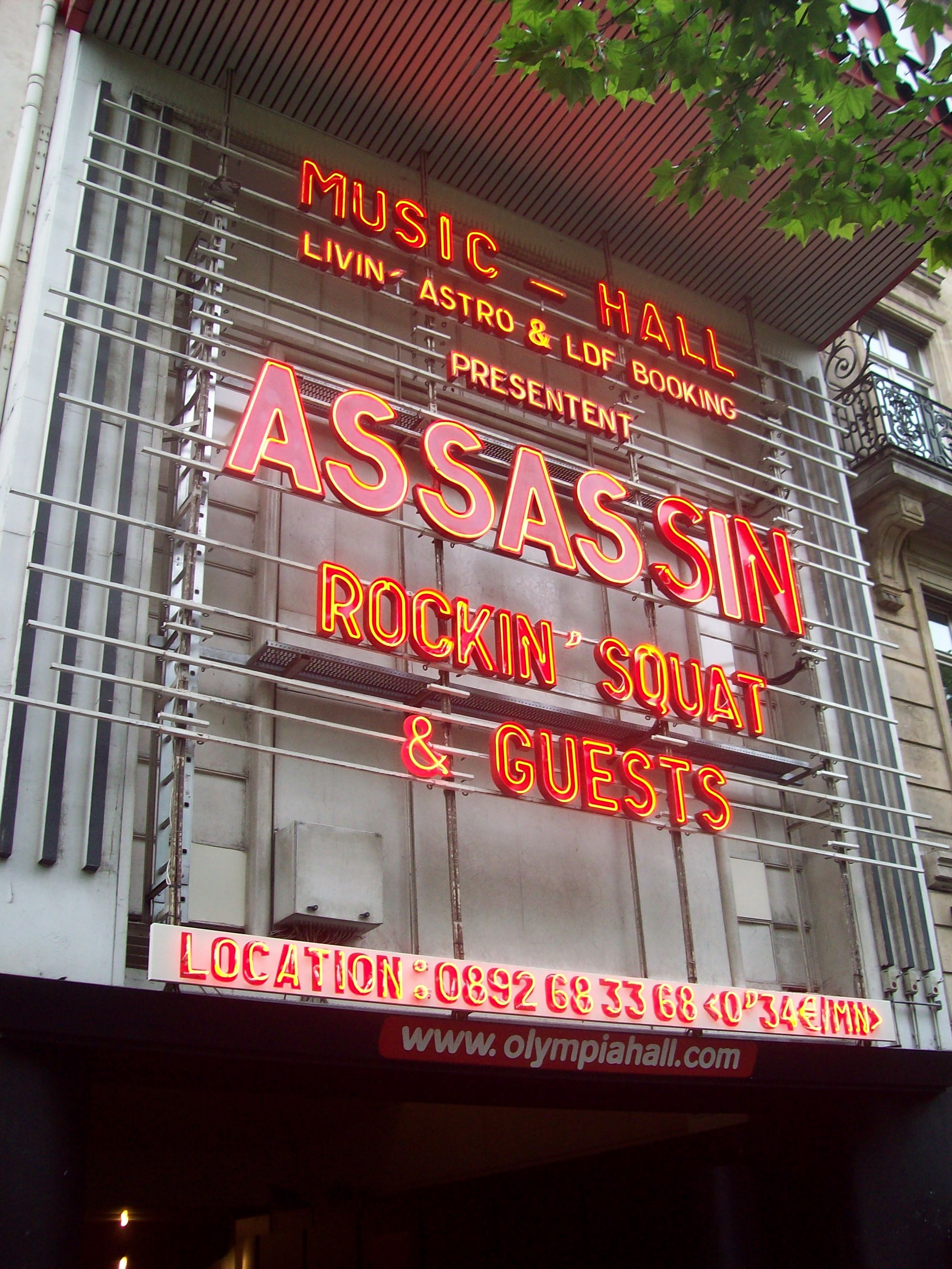 Facade du Music-hall L'olympia le 11 mai 2009 pour le show du groupe assAssin dans la salle.